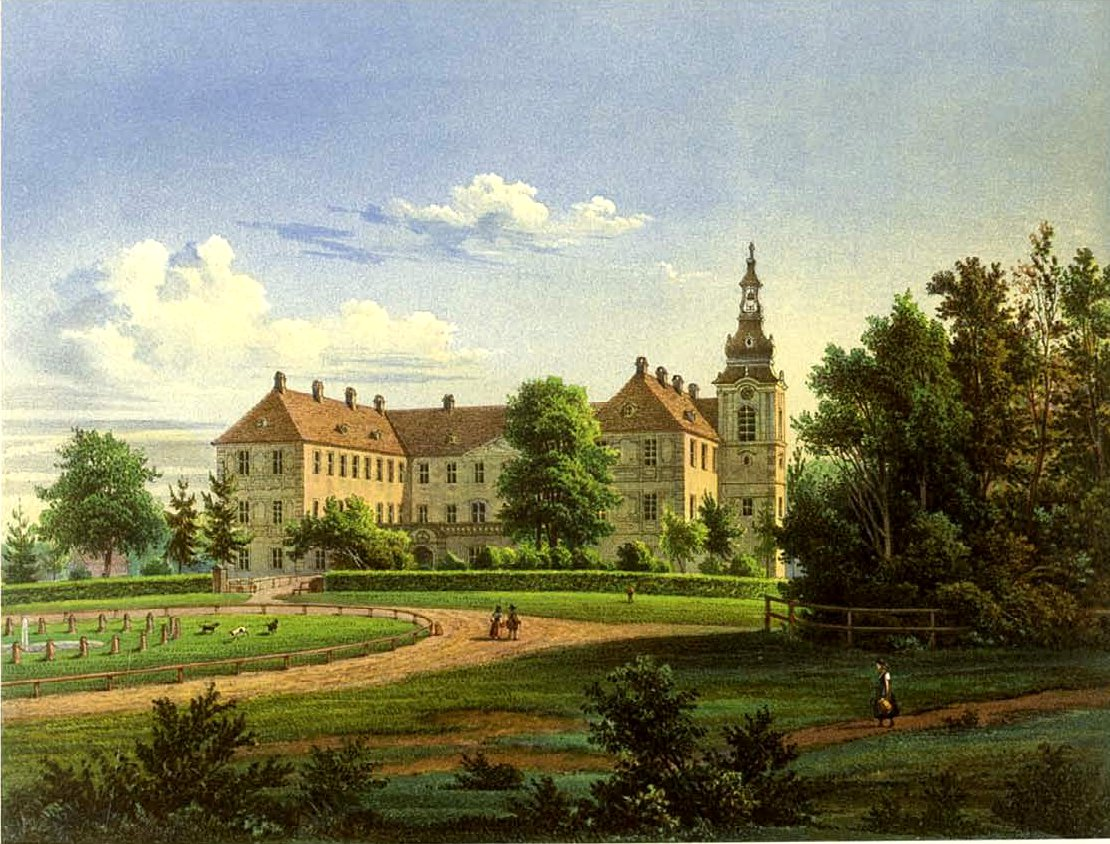 Schloss Saabor, Kreis Grünberg